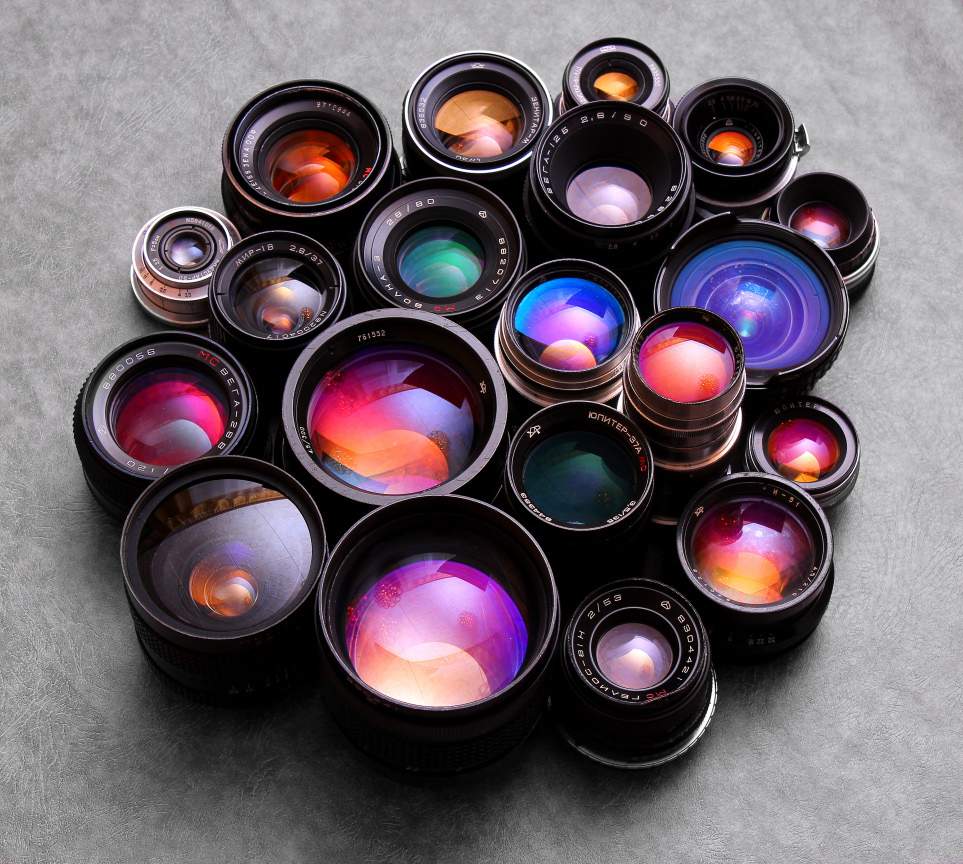 Объективы различных типов камер с многослойным просветлением.